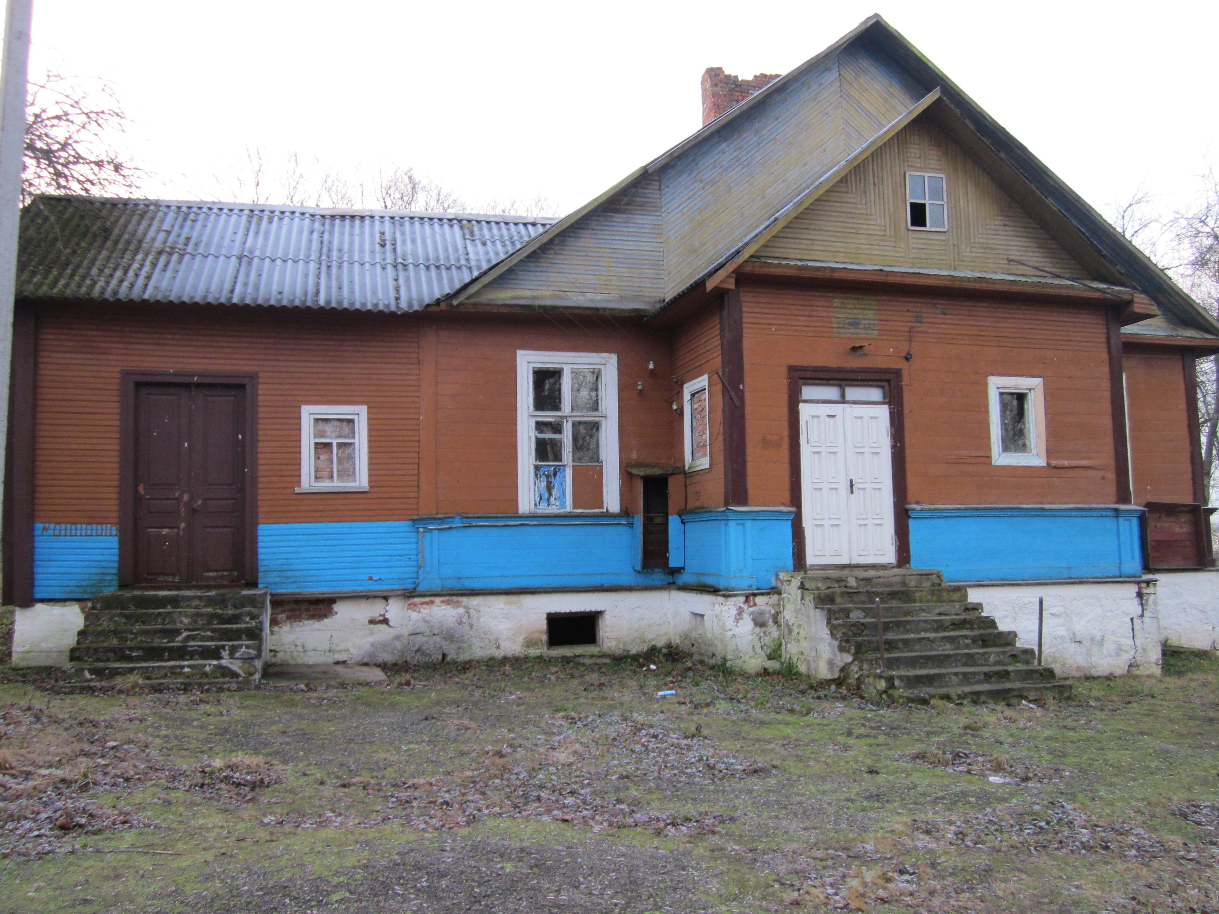 Беларуская (тарашкевіца): Комплекс былой сядзібы: сядзібны дом, парк, касьцёл, капліца-пахавальня. в. Уселюб This is a photo of Belarusian heritage monument. Reference number: 412Г000464 ( WLM)